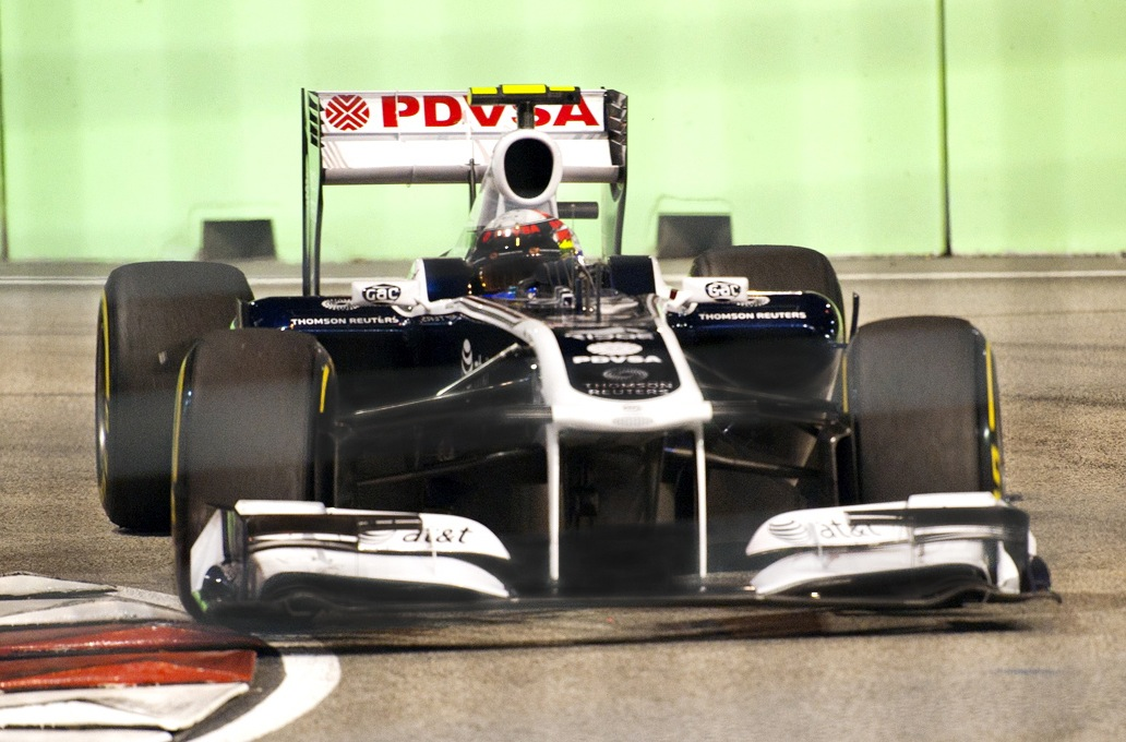 Pastor Maldanado